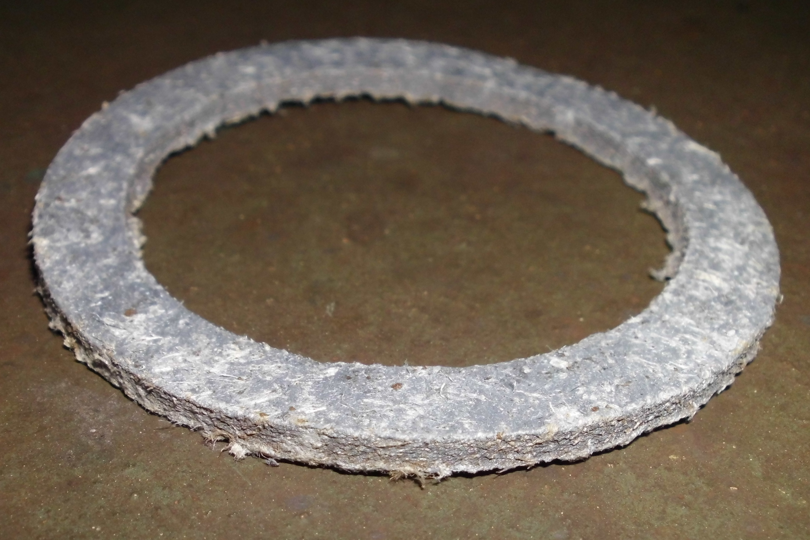 Фланцевая уплотнительная прокладка изготовленная из листа паронита.